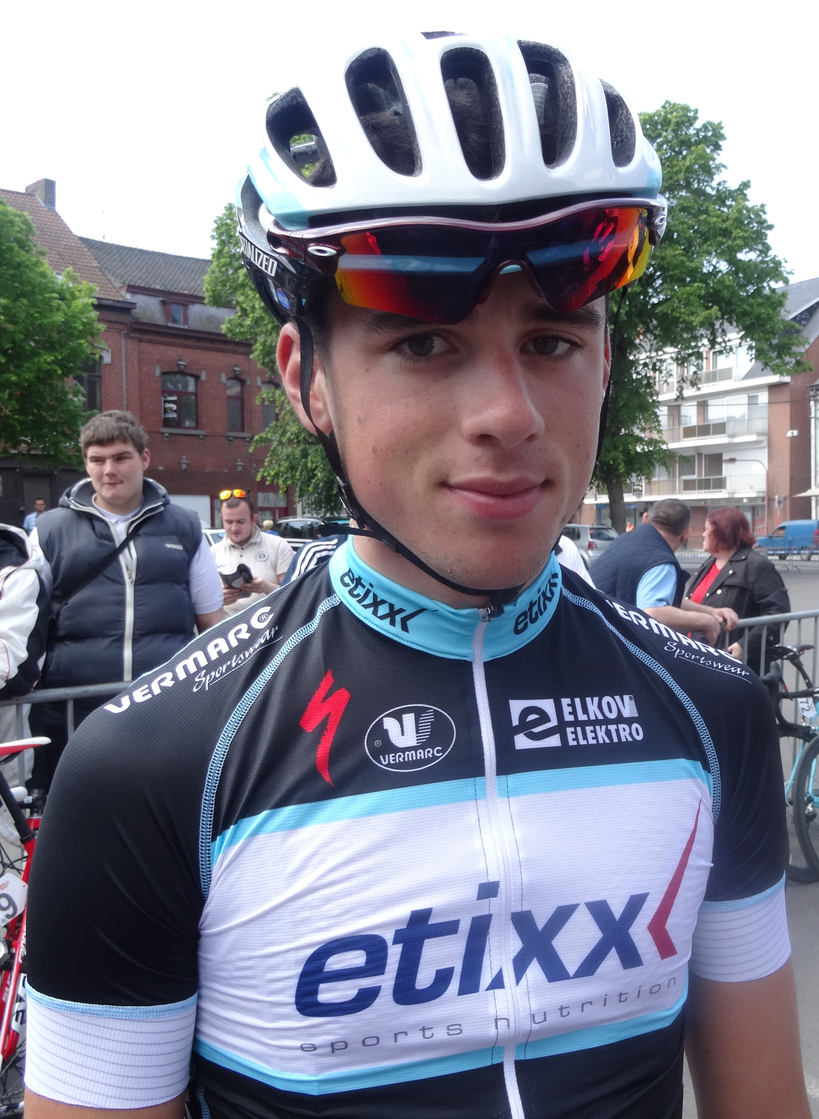 Reportage réalisé le samedi 17 mai à l'occasion du départ du Grand Prix Criquielion 2014 à Boussu, Belgique.